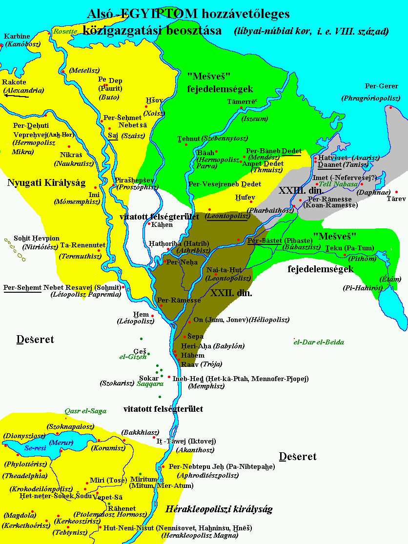 Egyiptom a líbiai korban (Kr. e. 8. sz.)